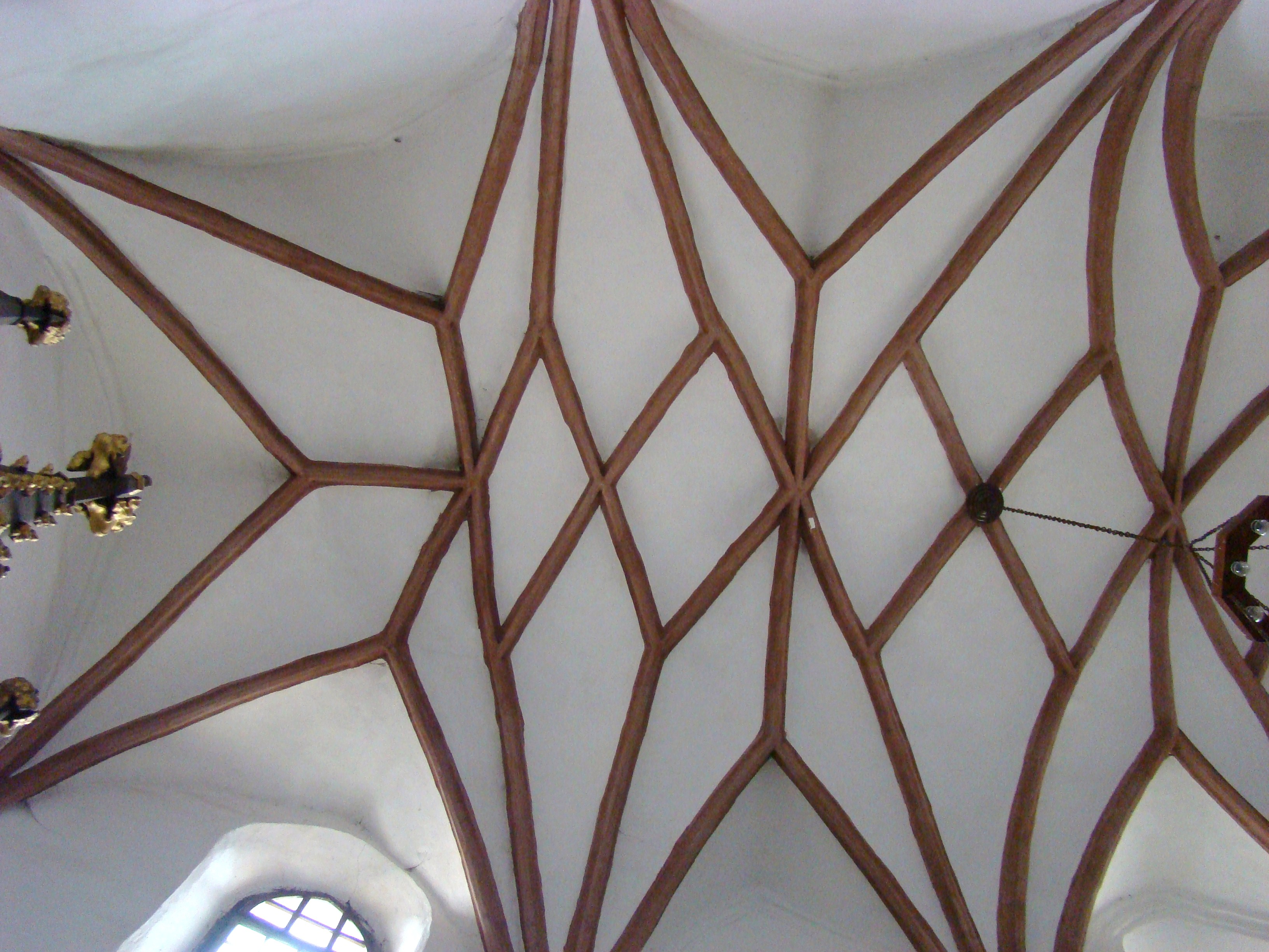 Biserica evanghelică fortificată, sat TÂRNAVA; comuna TÂRNAVA, județul Sibiu 01